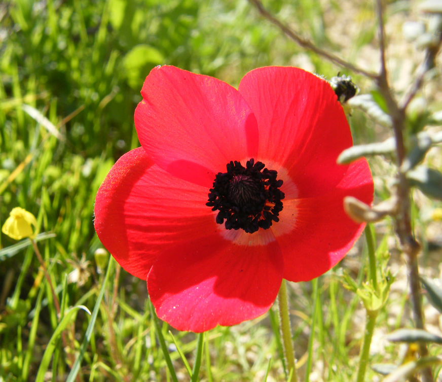 צולם ע"י עדו ארמיאץ בשדות באר יעקב